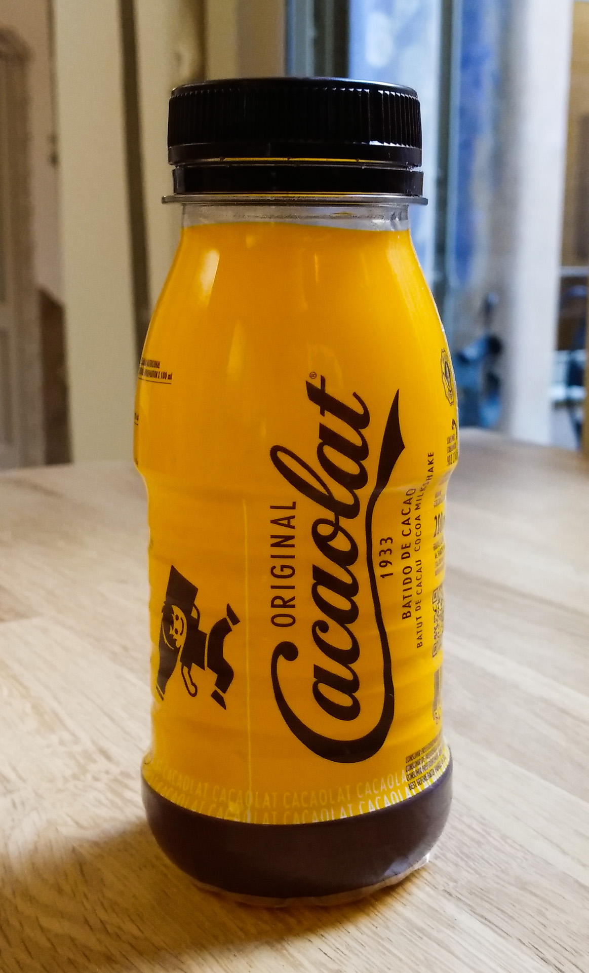 Botellín Cacaolat 200ml recortado